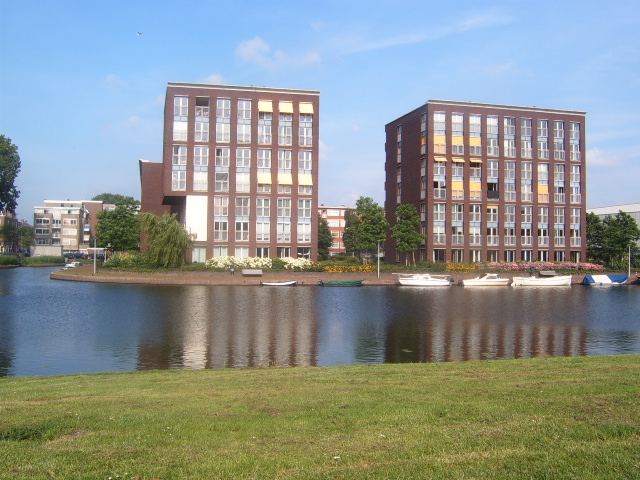 in Amsterdam. Joos Banckersplantsoen / Admiralengracht (Bos en Lommer)